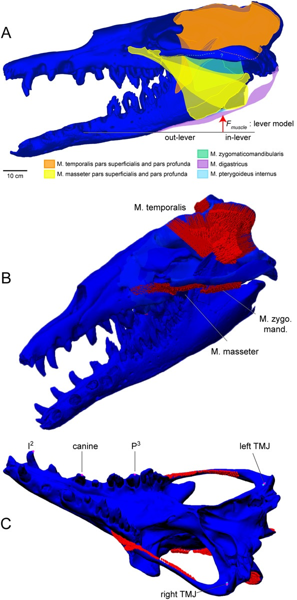 Jaw muscles of Basilosaurus isis and constraints for FEA. A. Jaw muscles of B. isis and muscle vector and moment arms for leverage-based force calculation. B. Adductors (red arrows) mapped onto a CTbased finite element model of the cranium of Basilosaurus isis WH-74, including the dentaries. C. Constraints for finite element analyses. In the all-muscles active analysis, the cranium was fully constrained at the left and right temporomandibular joints (TMJ), and tooth constraints were applied in respective bite analyses. In the posterior shear analysis, the only active muscles are the posterior temporalis, and only P3 is constrained.